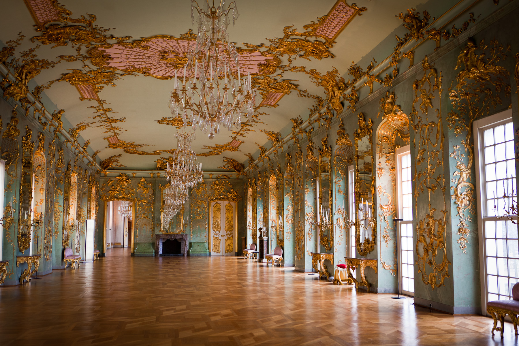 Berlin